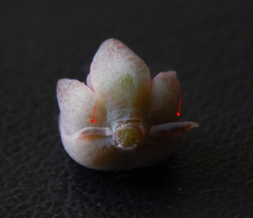 d